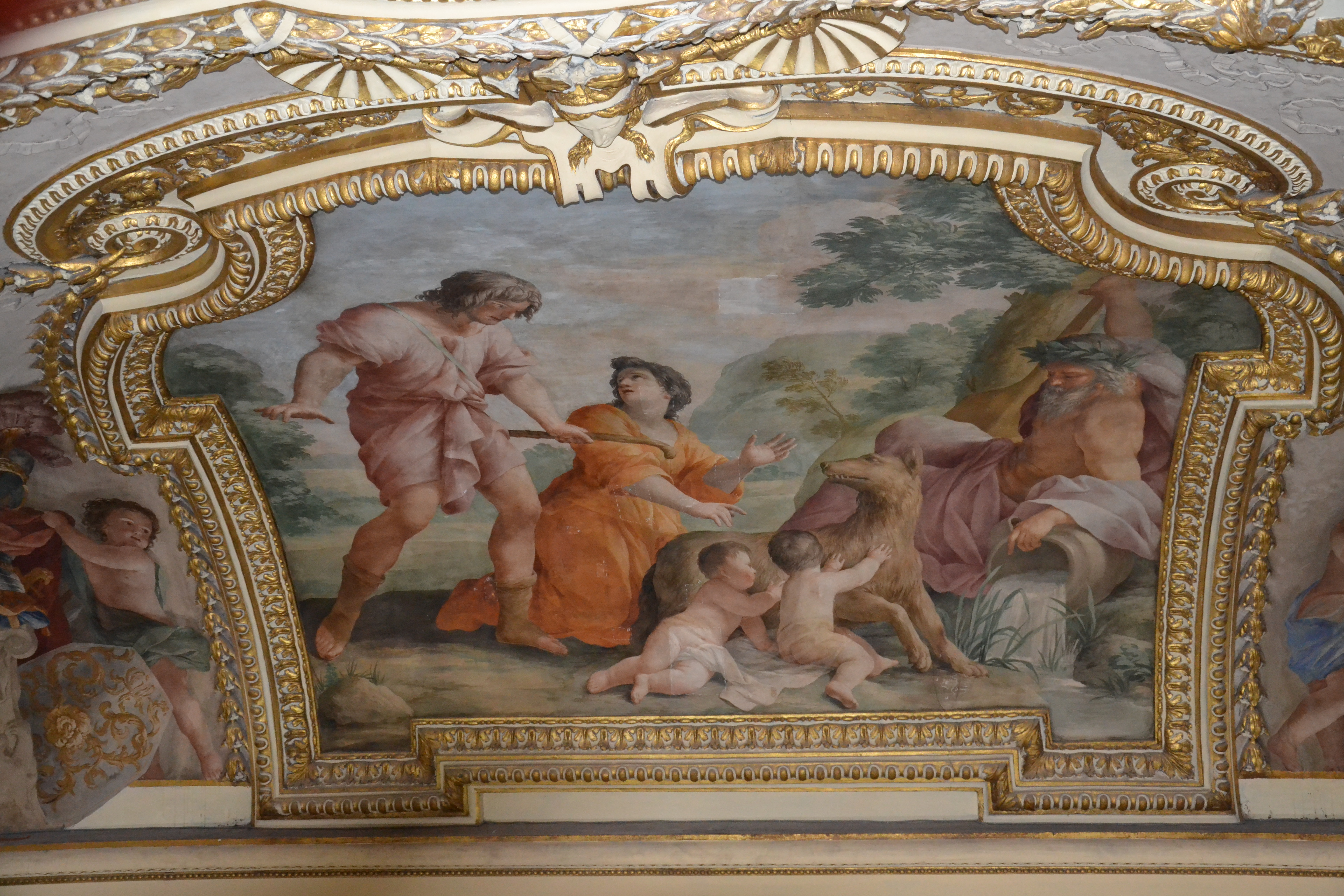 Giovanni Francesco Romanelli, Galerie Mazarine, fresques au plafond, Paris, site Richelieu de la Bibliothèque nationale de France : Romulus et Rémus.